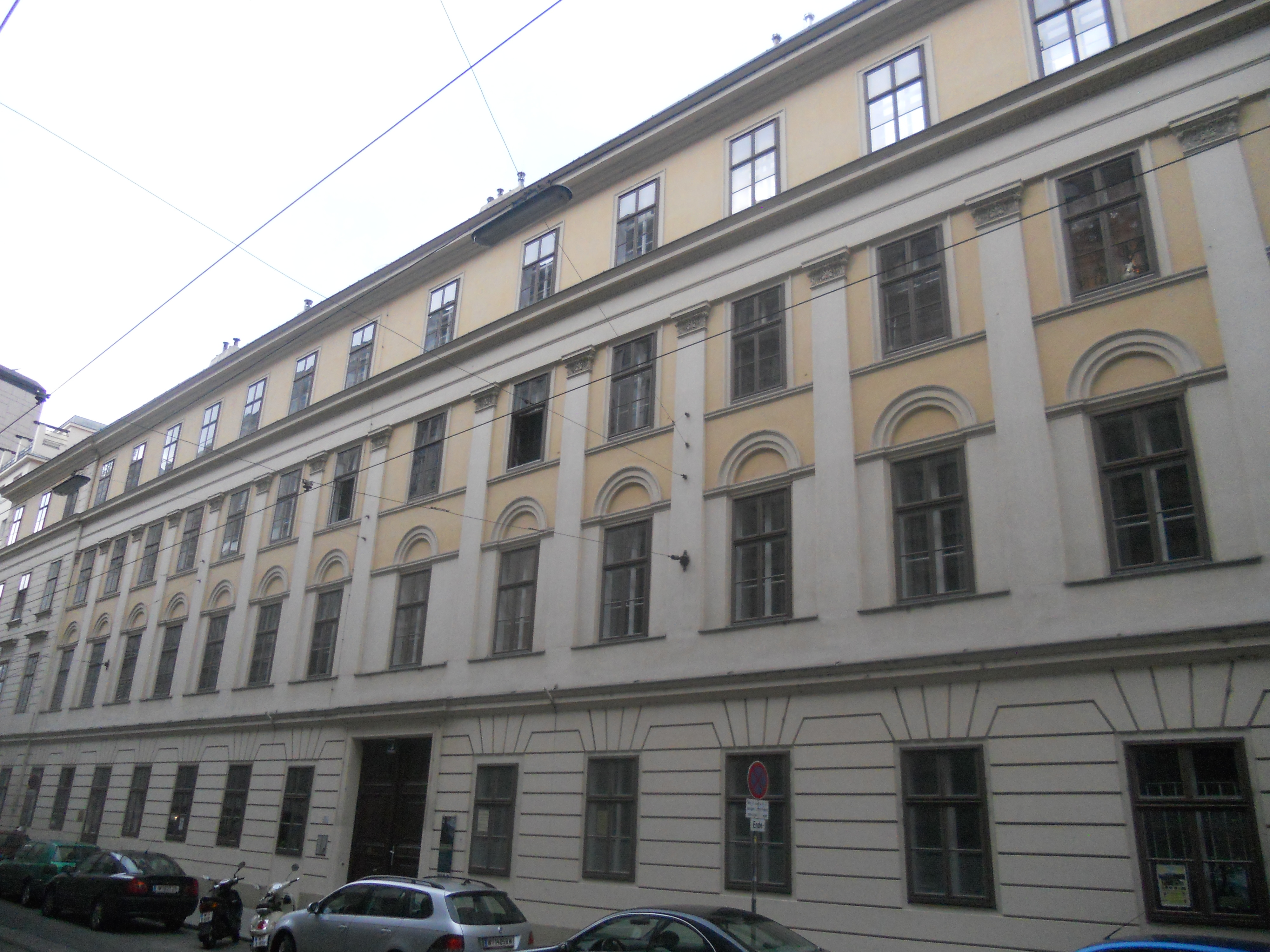 Haus Ungargasse 3, Miethaus der Elisabethinen